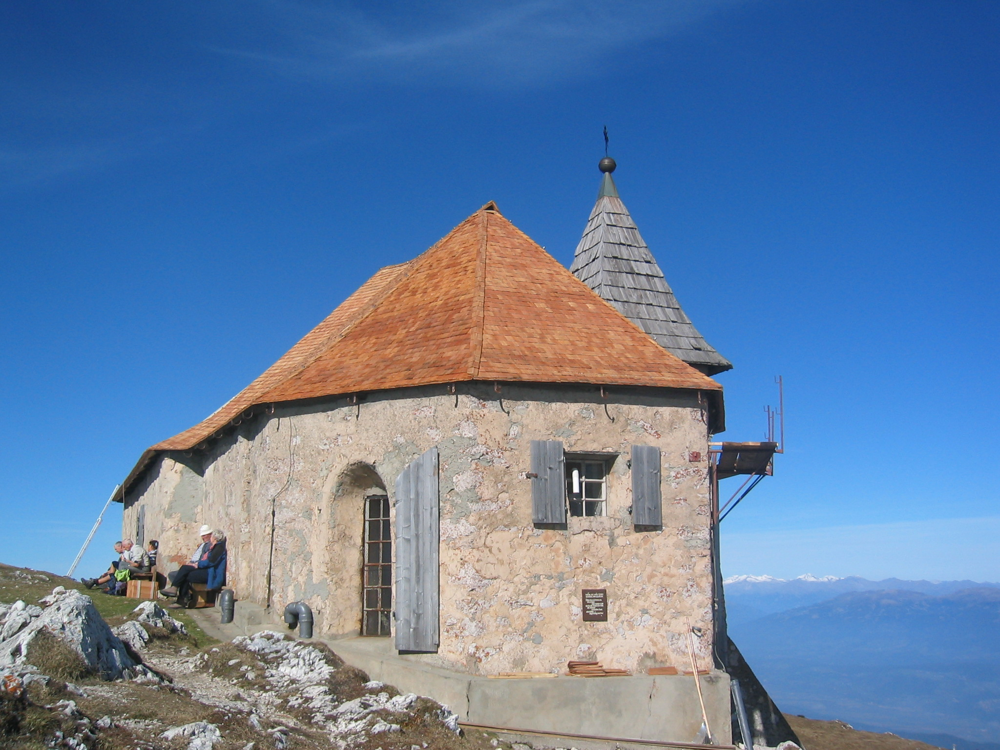 Die Deutsche Kirche am Dobratsch ist die höchste Bergkirche Europas. Im Sommer 2005 wurde das Dach mit Lärchenschindeln neu eingedeckt.